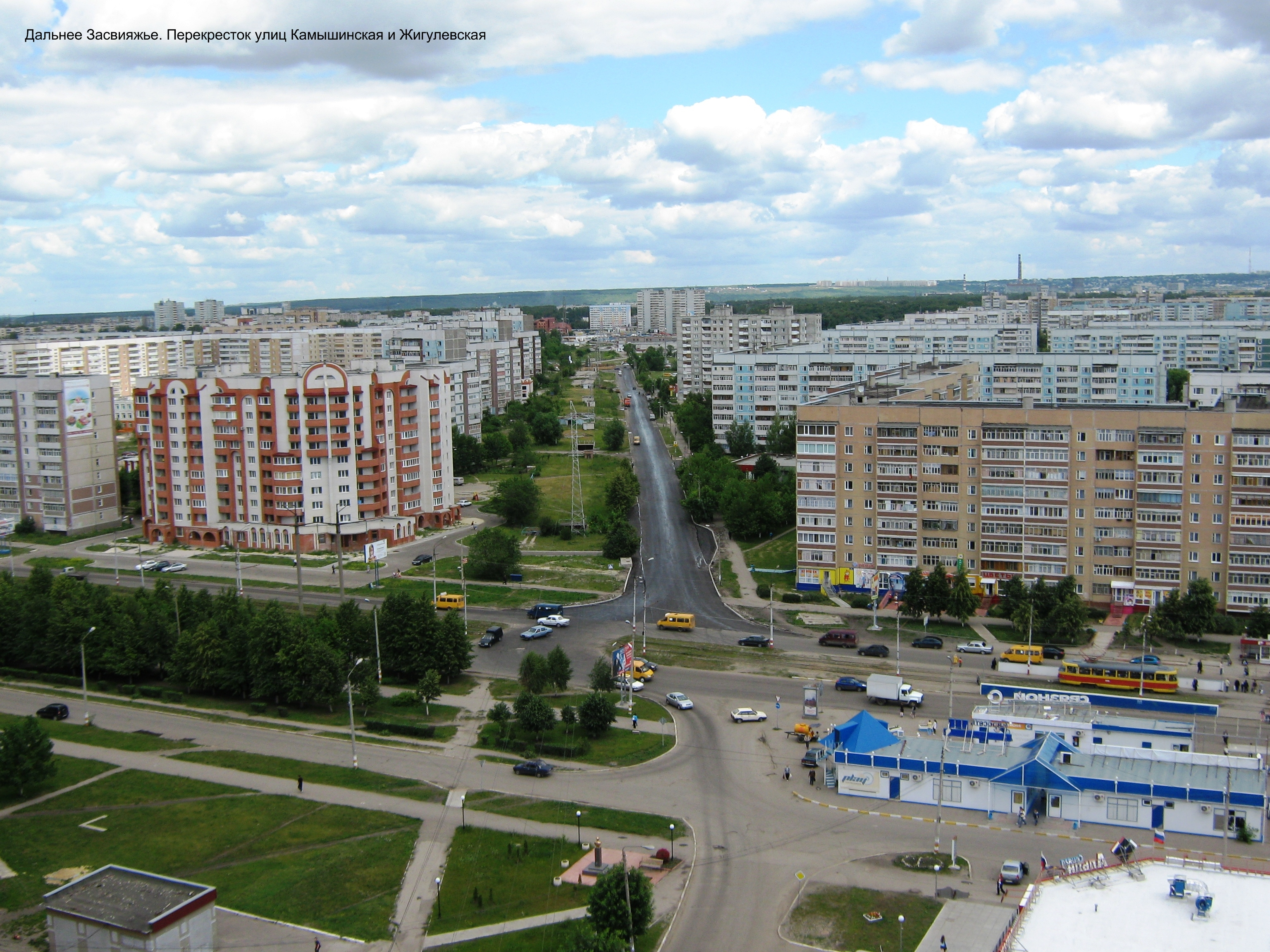 Ульяновск. Засвияжье.